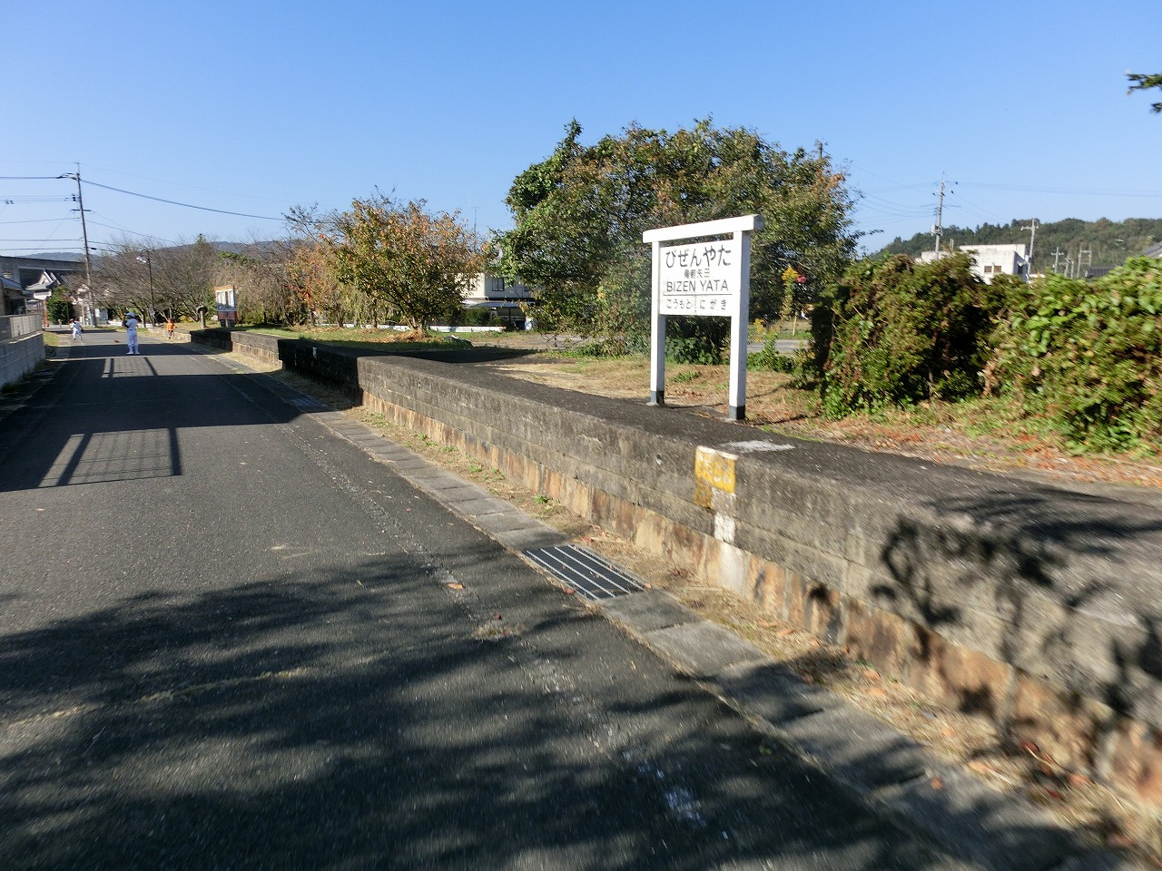 旧同和鉱業片上鉄道-備前矢田駅跡 岡山県道703号備前柵原自転車道線